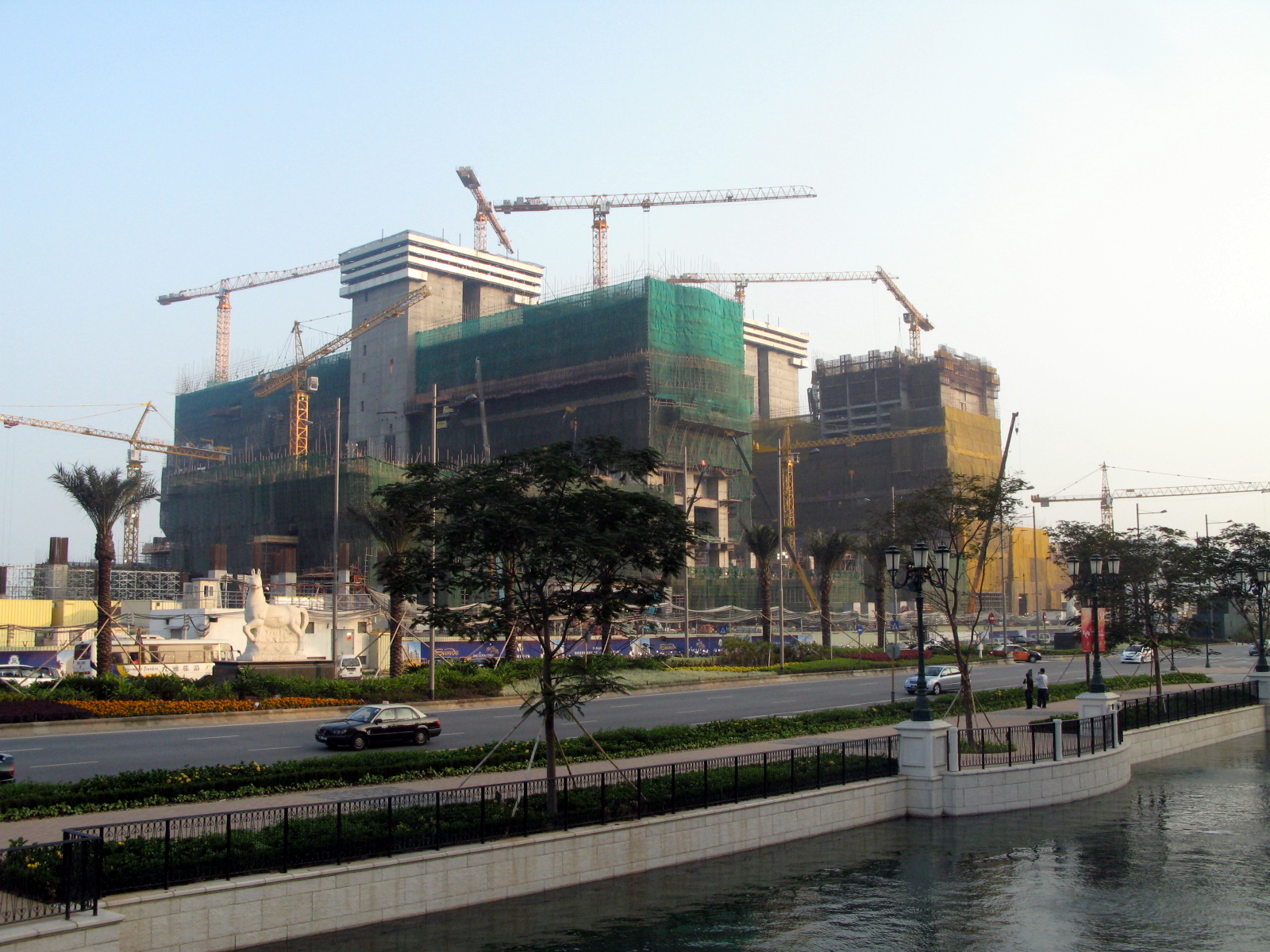 Macao Cotai Strip